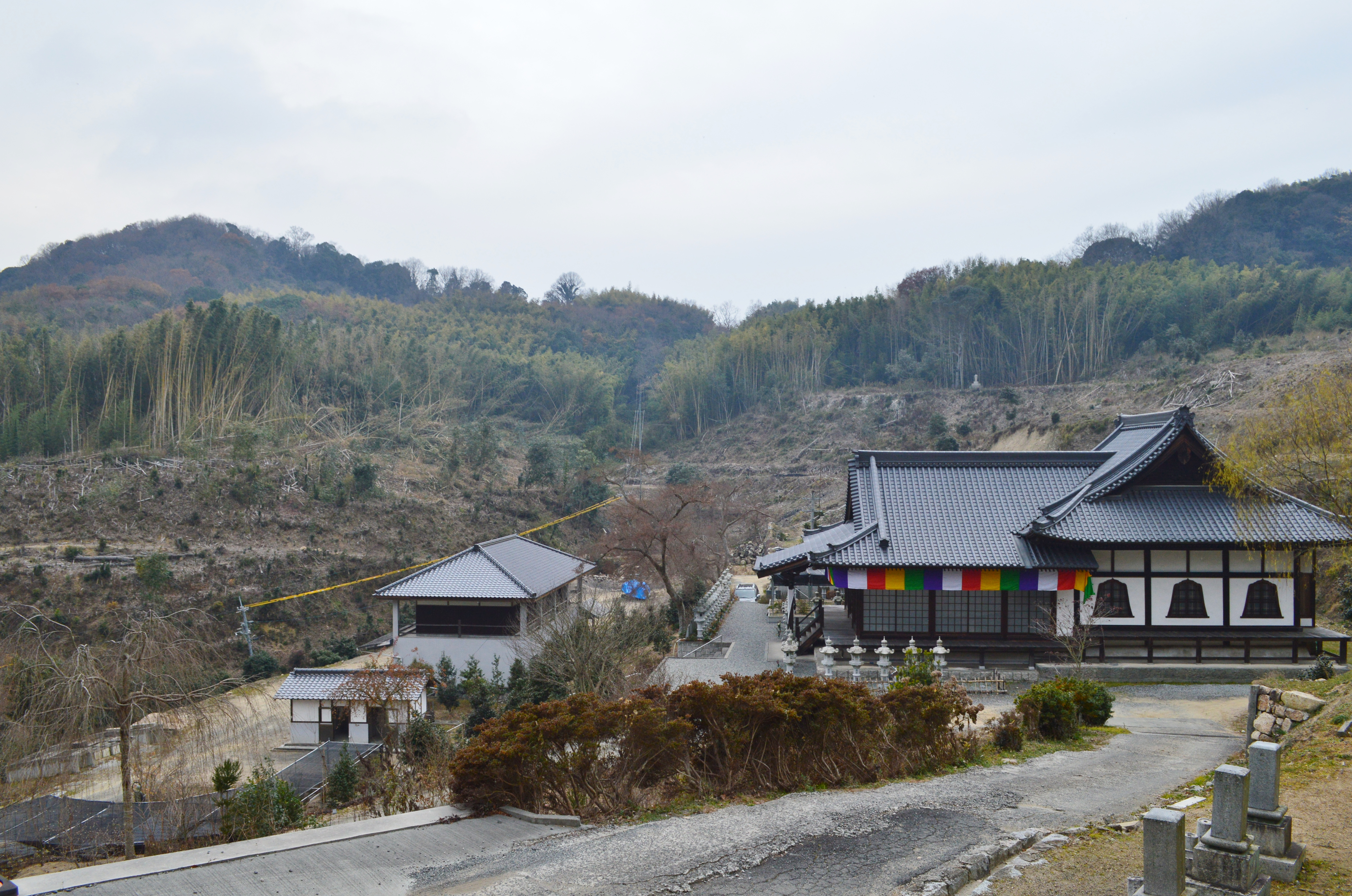 常楽寺 (岡山市) 境内と小廻山頂